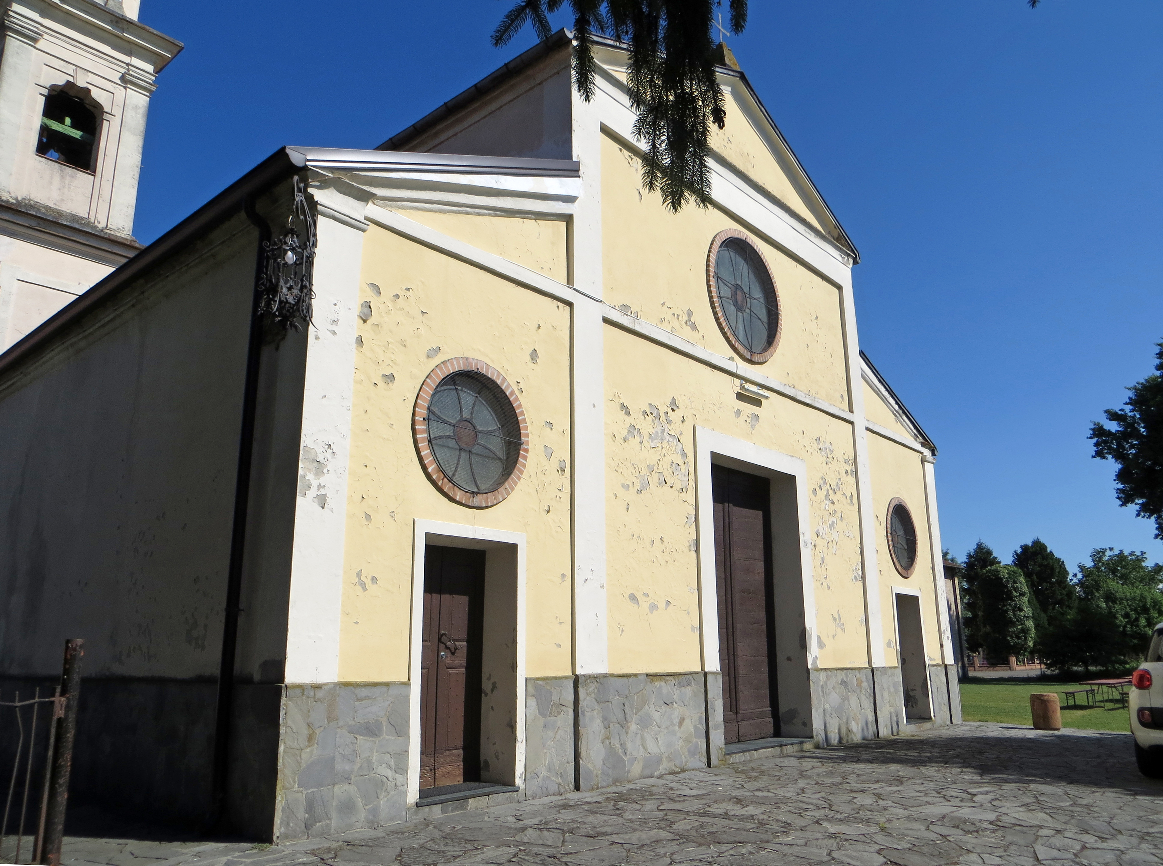 Chiesa di Sant'Egidio (Eia, Parma) - facciata